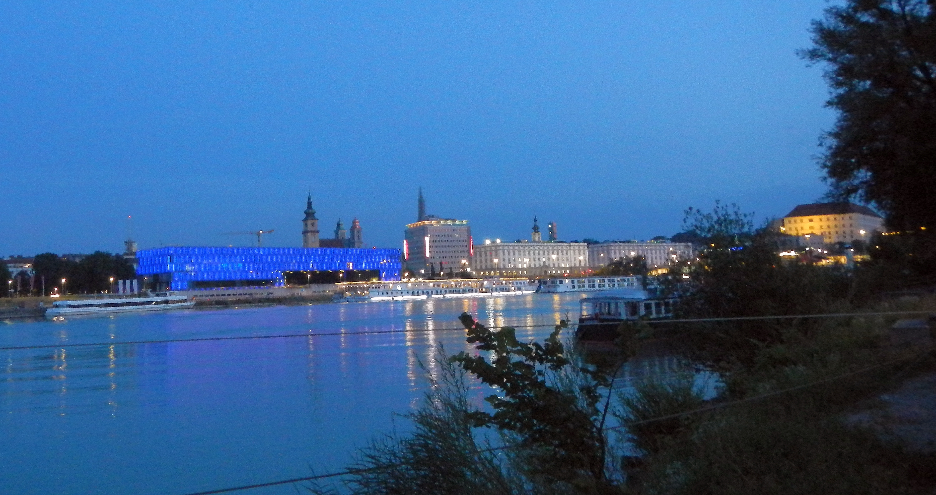 Donauufer in Linz, Blick Richtung Lentos und Schloss